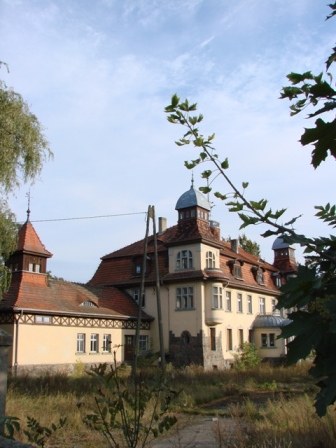 Czerlejno - zespół pałacowy pałac z oficyną z 1913 r., park z początku XX w. (zabytek nr 2207/A)